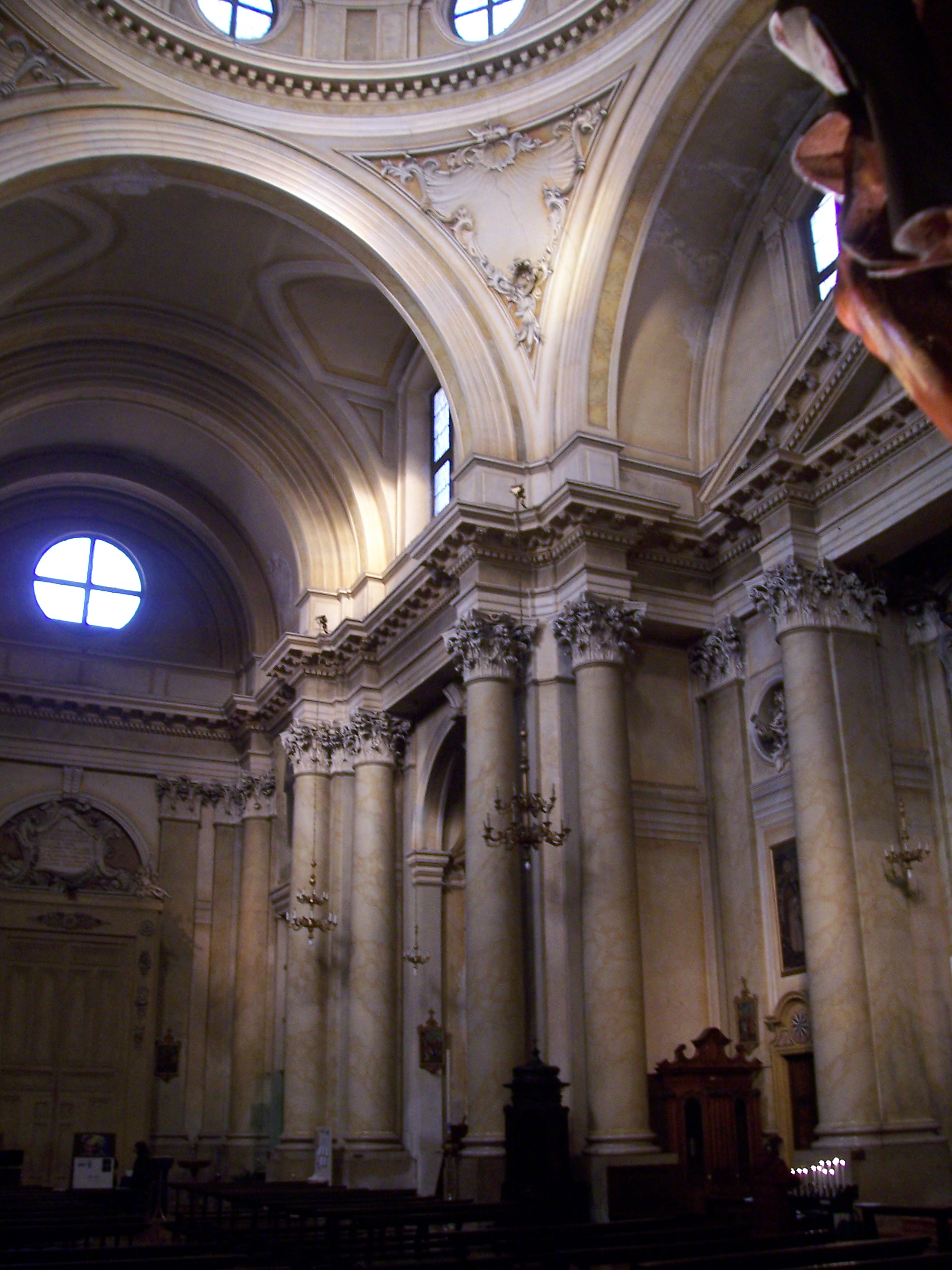 san lorenzo brescia interno2.jpg